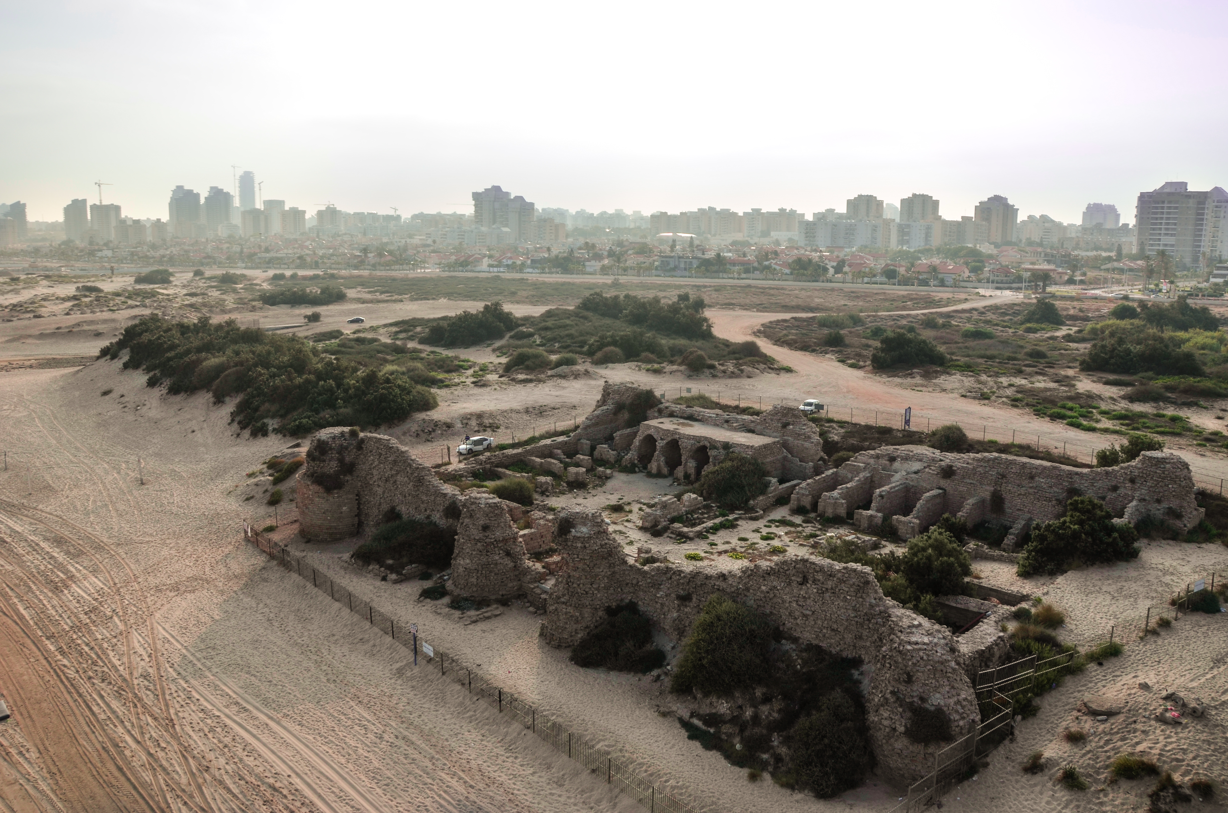 מאה ה-11 התקופה ממנה נשמרו השרידים המרשימים שנמצאים לחופה הדרומי של אשדוד, וביניהם מצודת אשדוד-ים הגדולה שמכונה בערבית קלעת אל-מינה. חפירות ארכאולוגיה